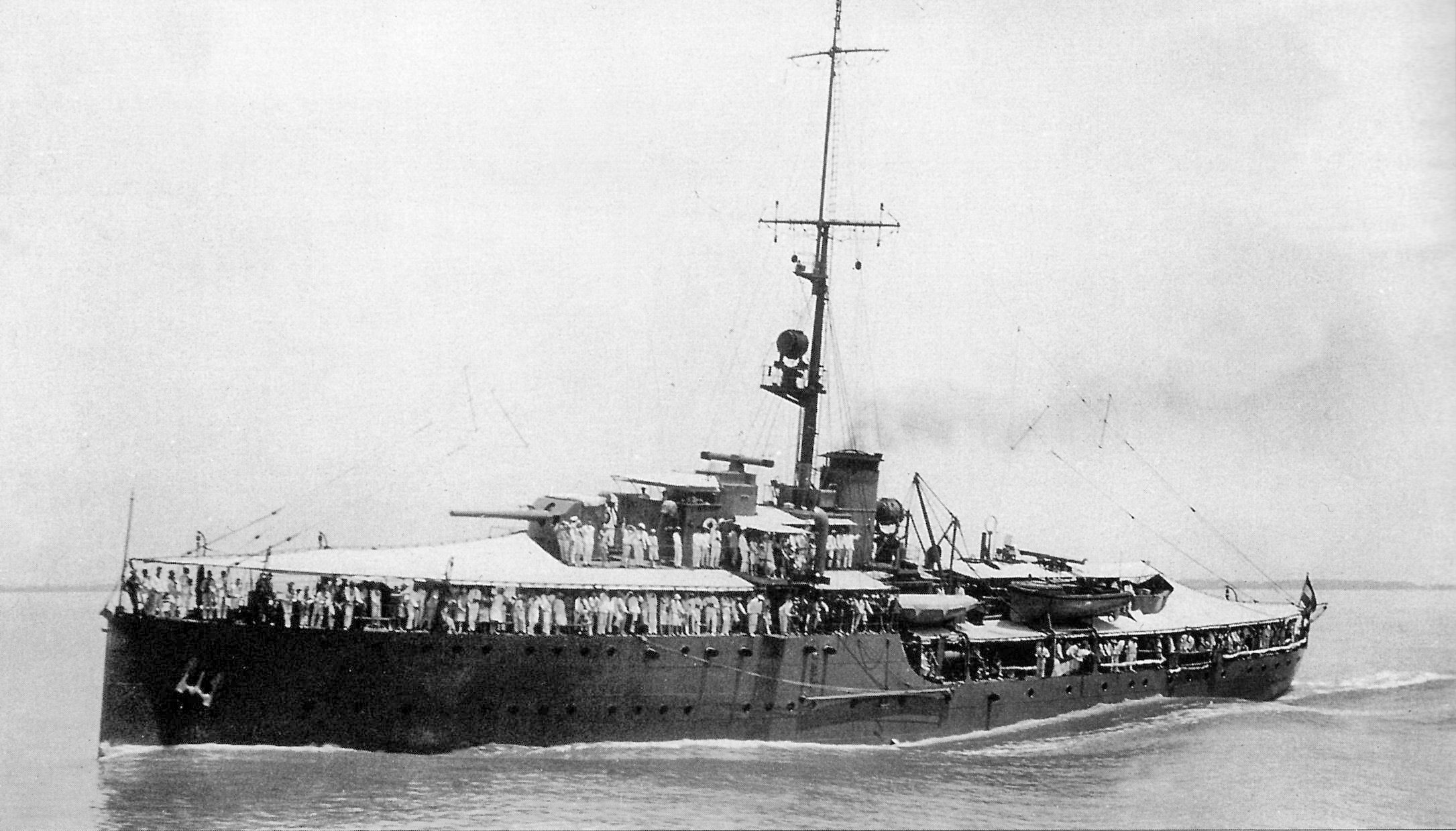 Hr. Ms. Soemba met genodigden in 1930